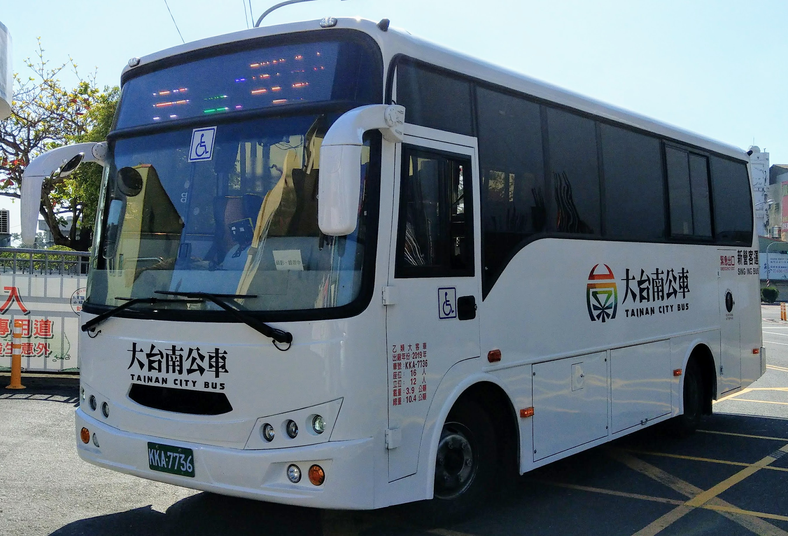 新營客運2019年12月出廠HINO FC7JGTZ-AZF(復康型)，固亞車體 KKA-7736